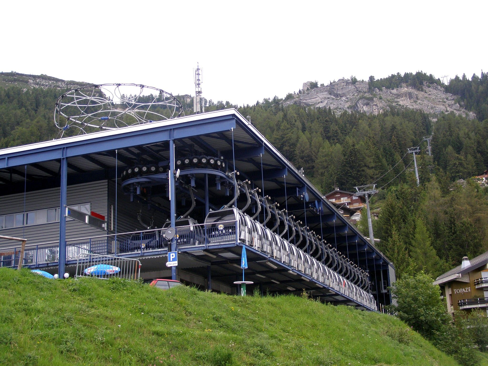 Dolná stanica lanovky na Pas-de-Maimbré (2362 m n.m.)